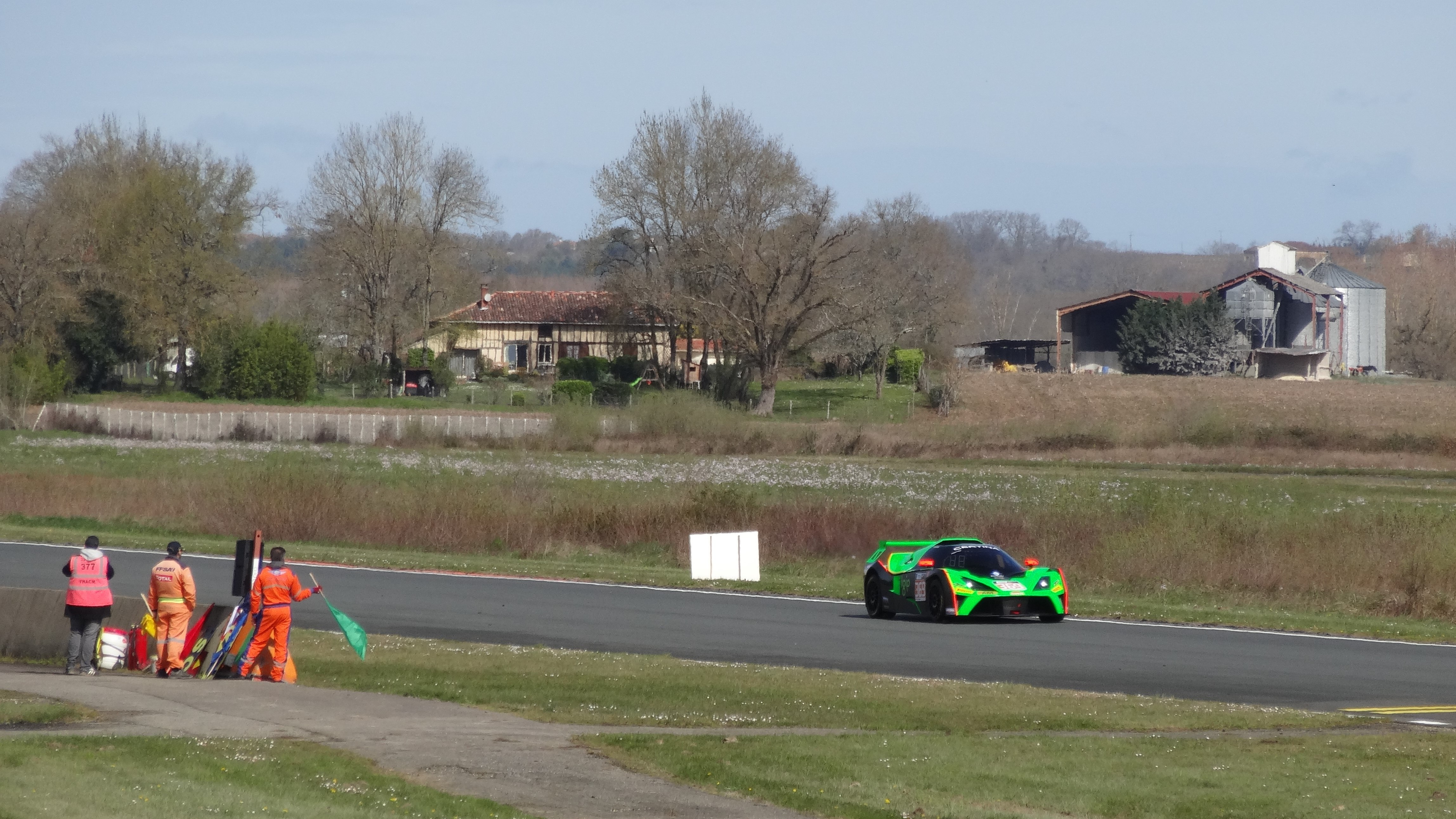 51e Coupes de Pâques (sport automobile), sur le Circuit Paul Armagnac à Nogaro (Gers) : FFSA GT4 France.